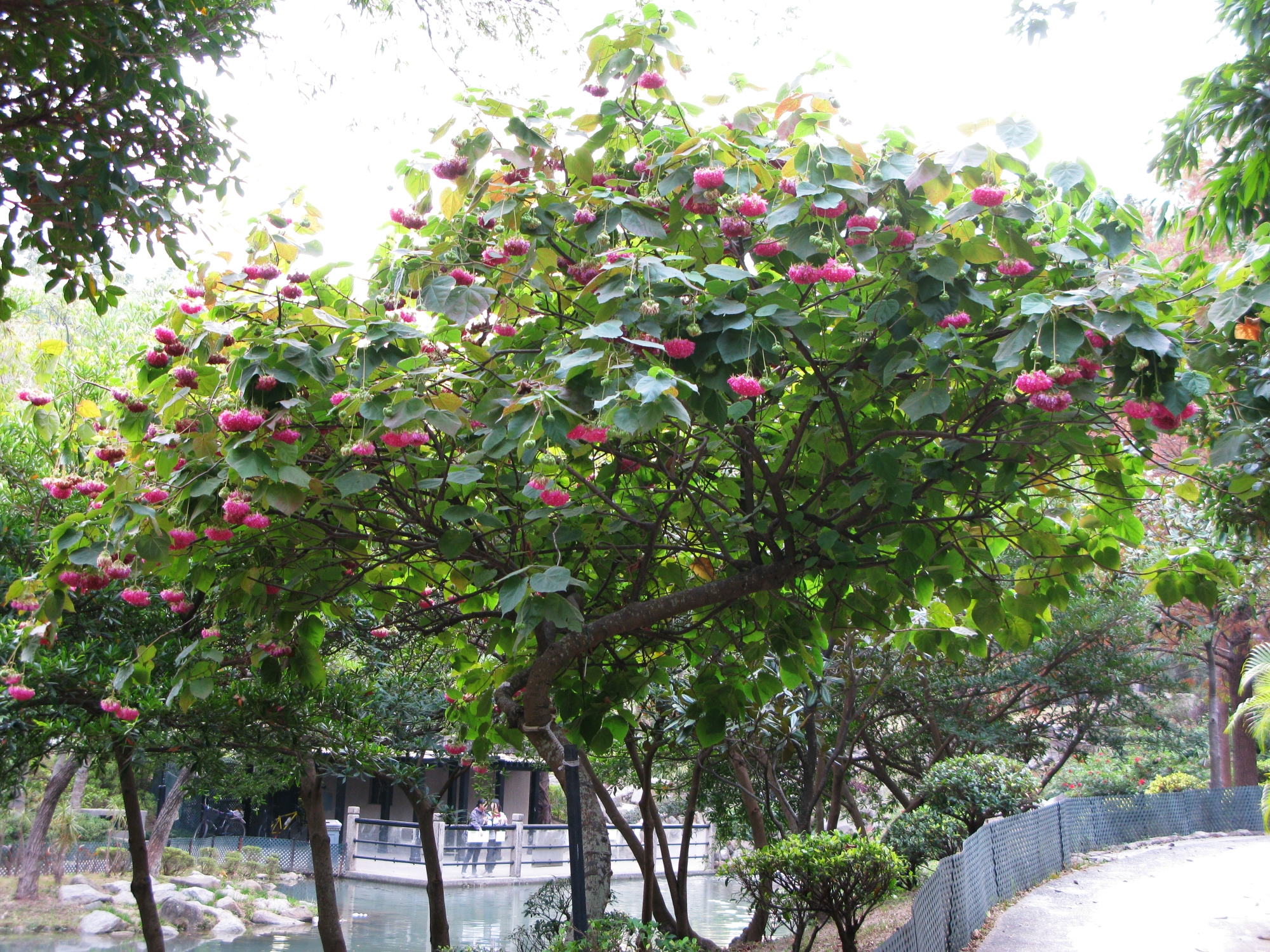 Pinkball (Dombeya Wallichii) in Hong Kong